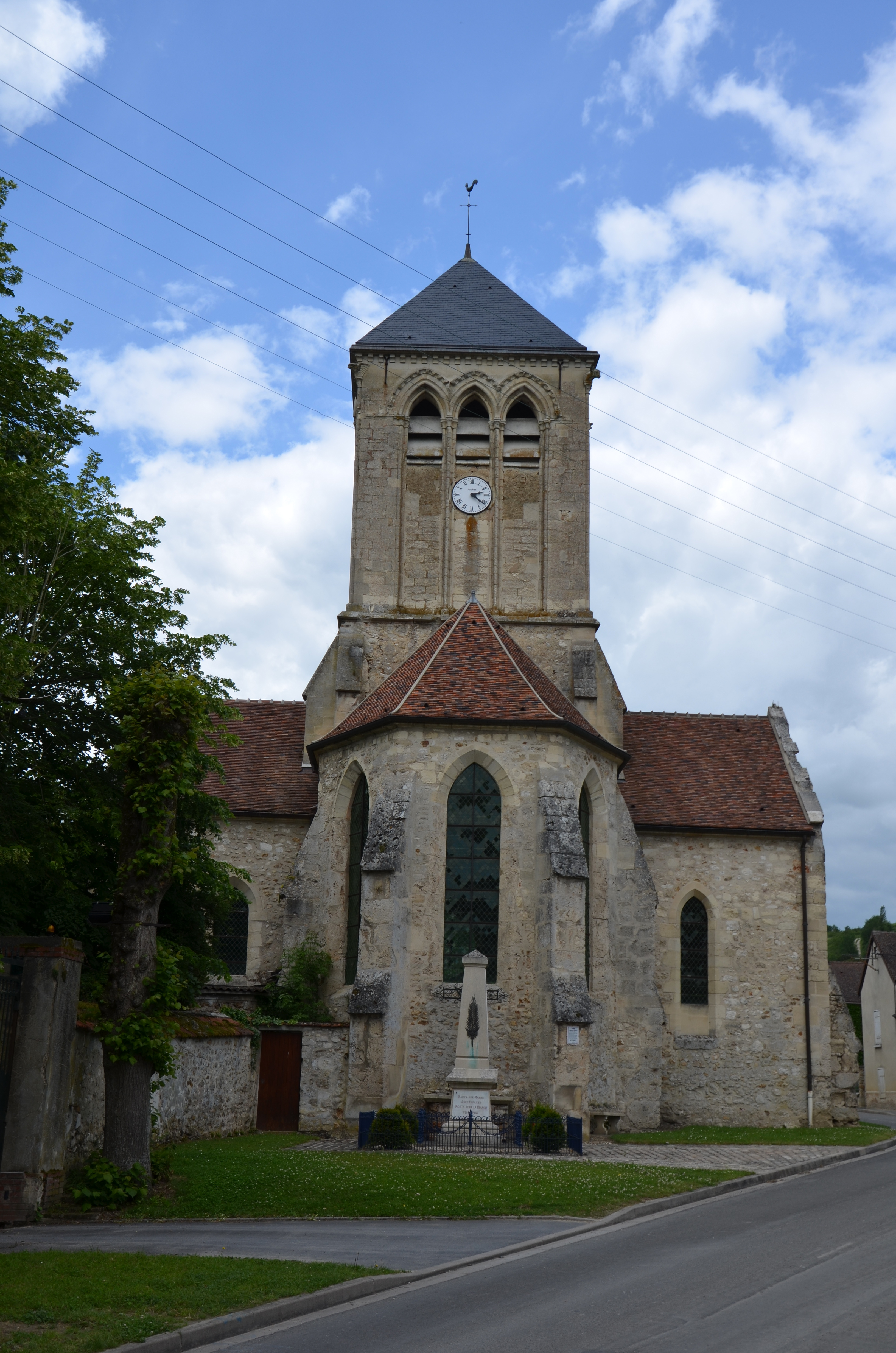 Eglise de Barzy sur Marne, Aisne, France